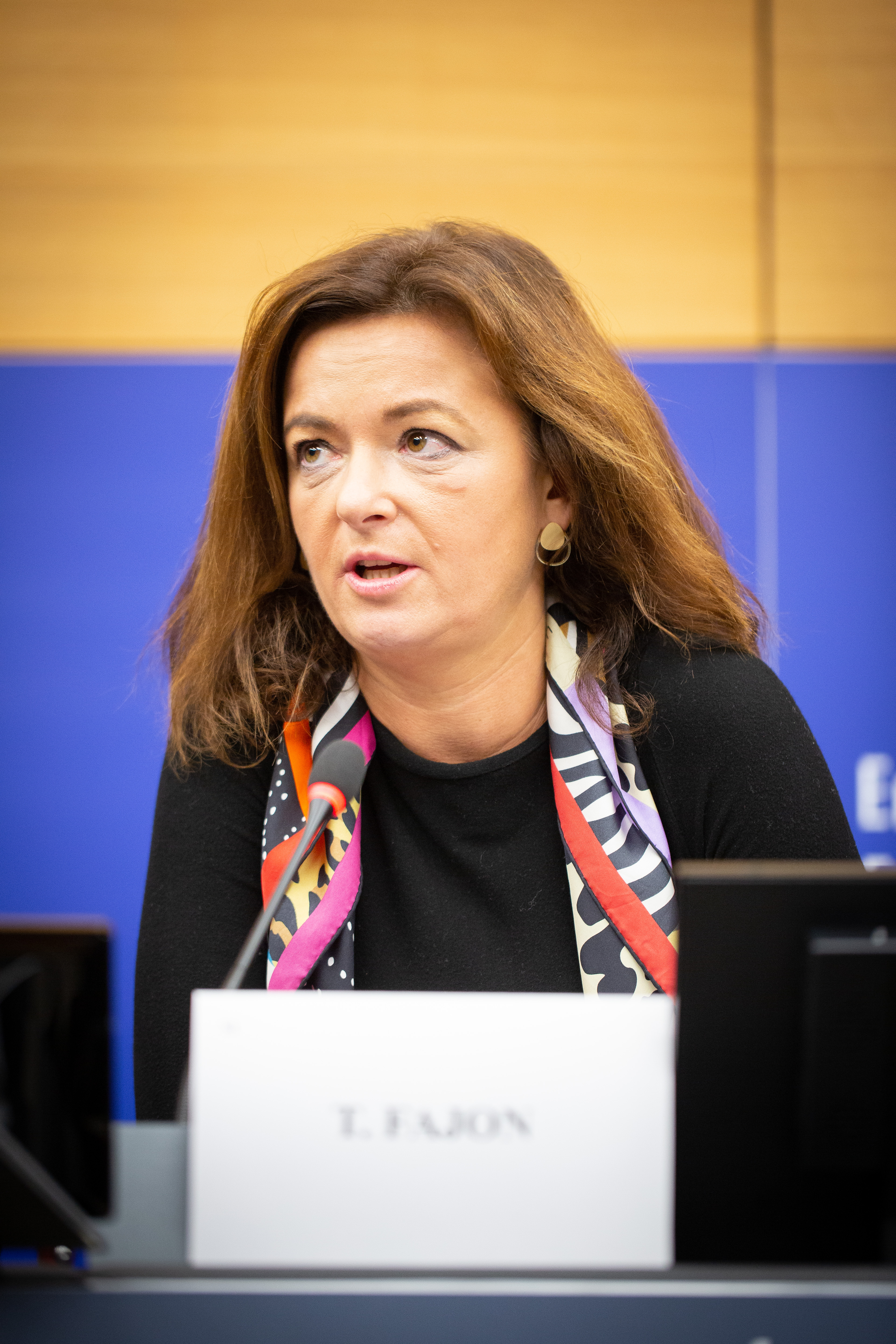 F70A5585-2